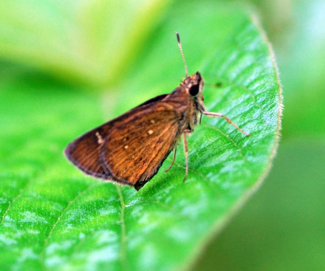 Vindhyan bob WSF Arnetta vindhiyana